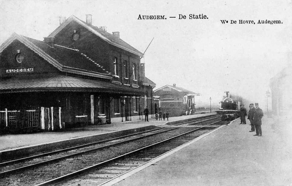 L'intérieur de la gare d'Audegem vers 1900.